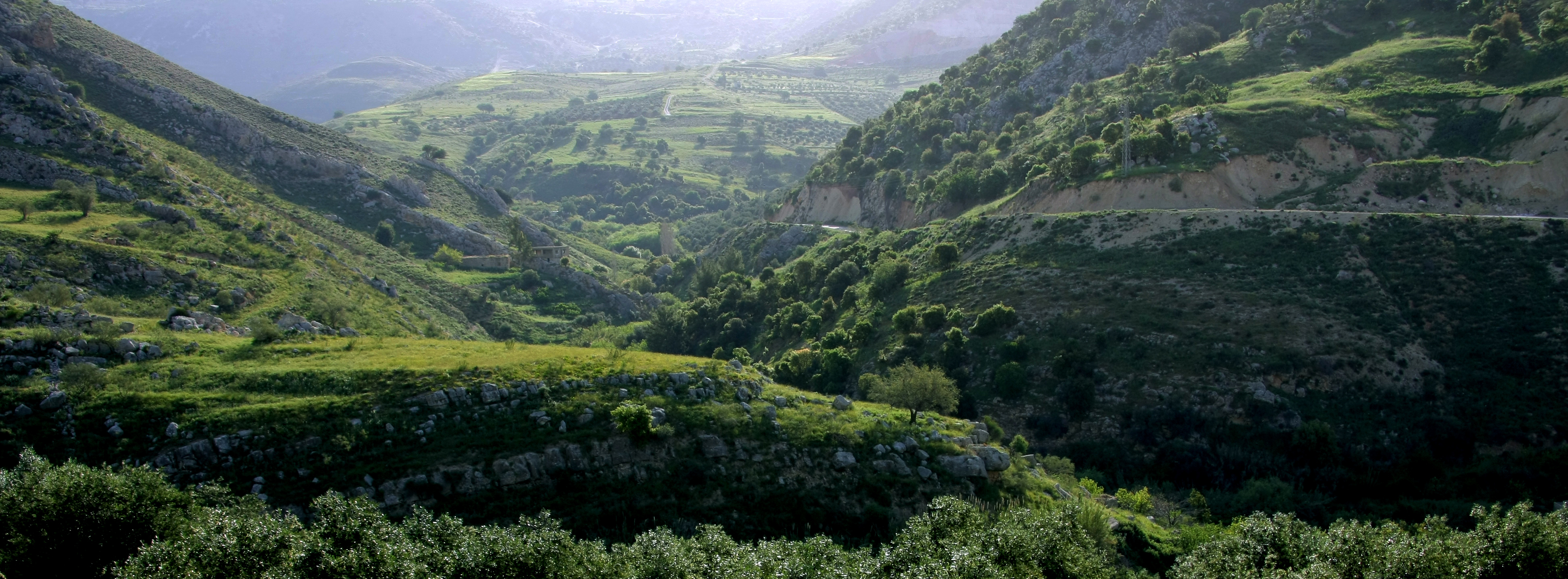 Wadee Shoayb